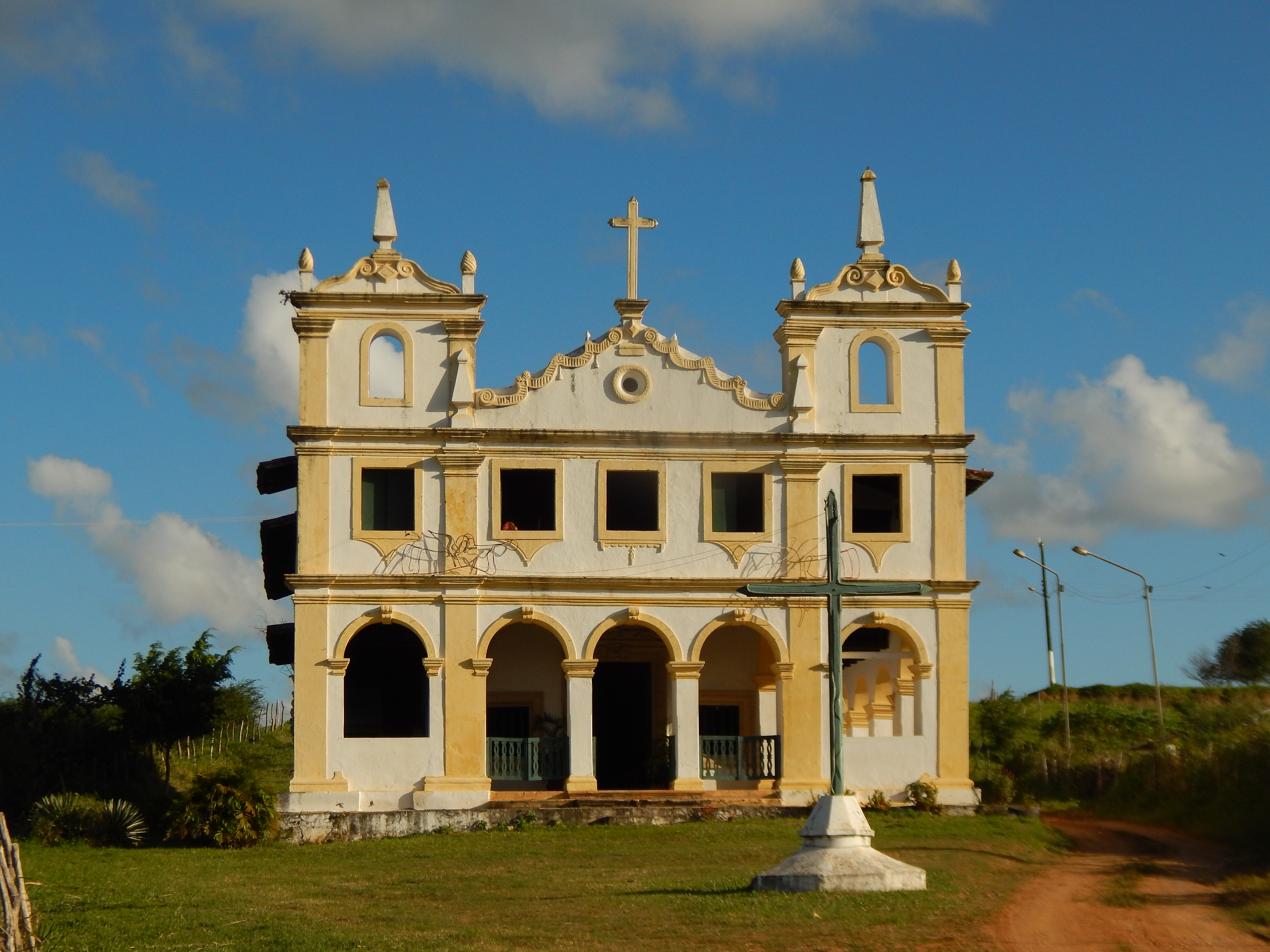 Igreja de Comandaroba